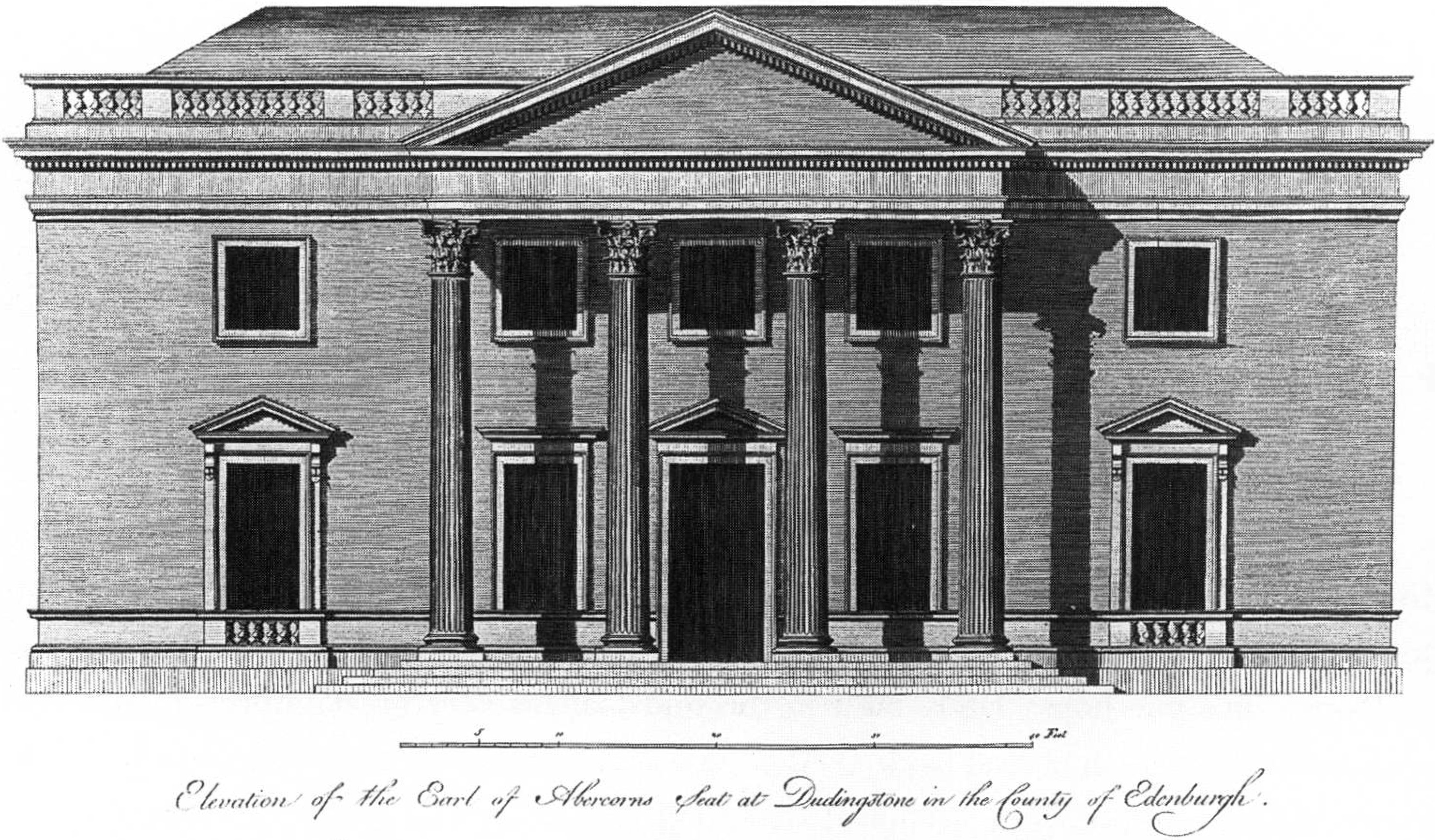 Entwurfszeichung für Duddingston House